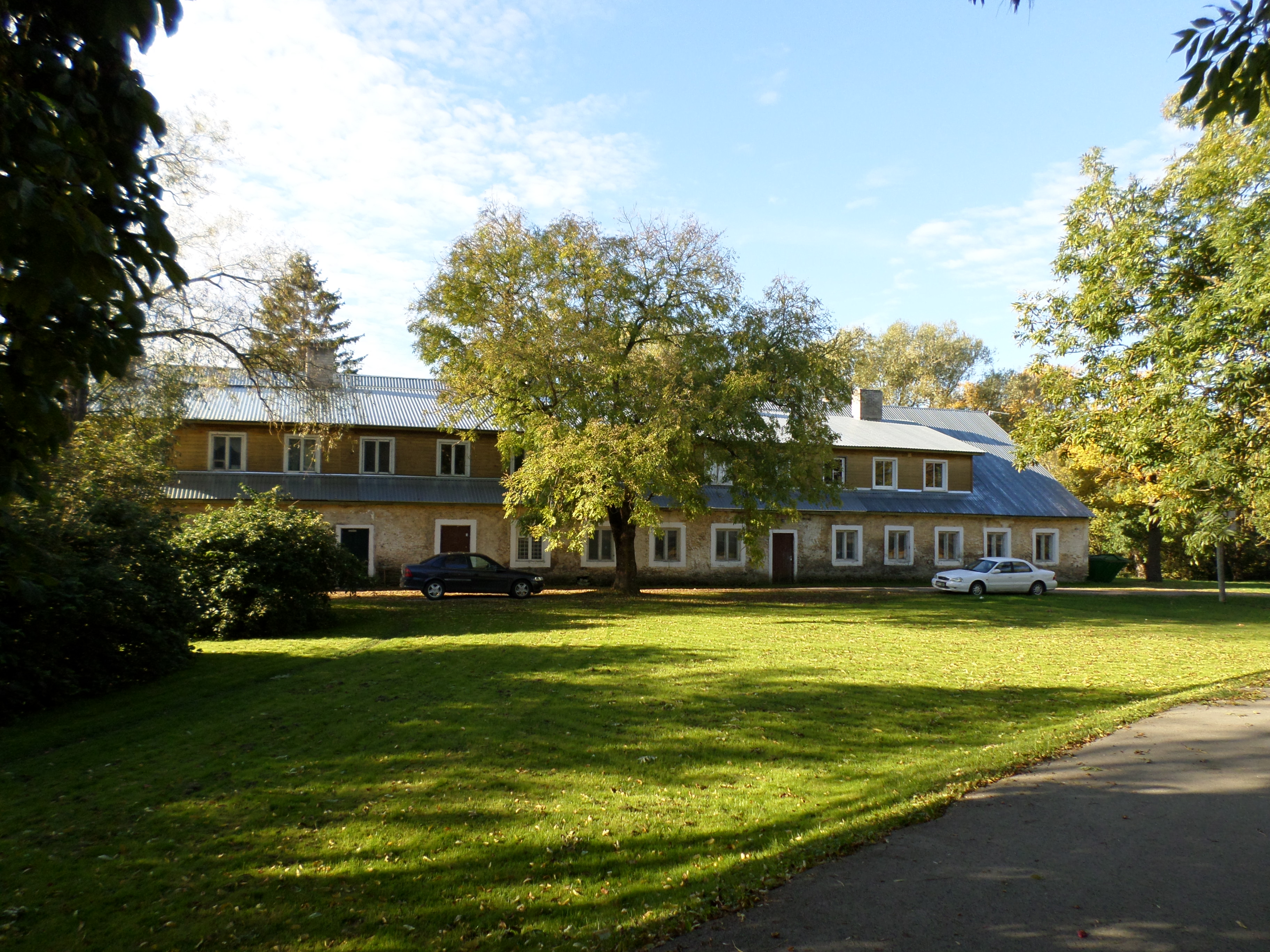 Lehmja mõisa moonakatemaja